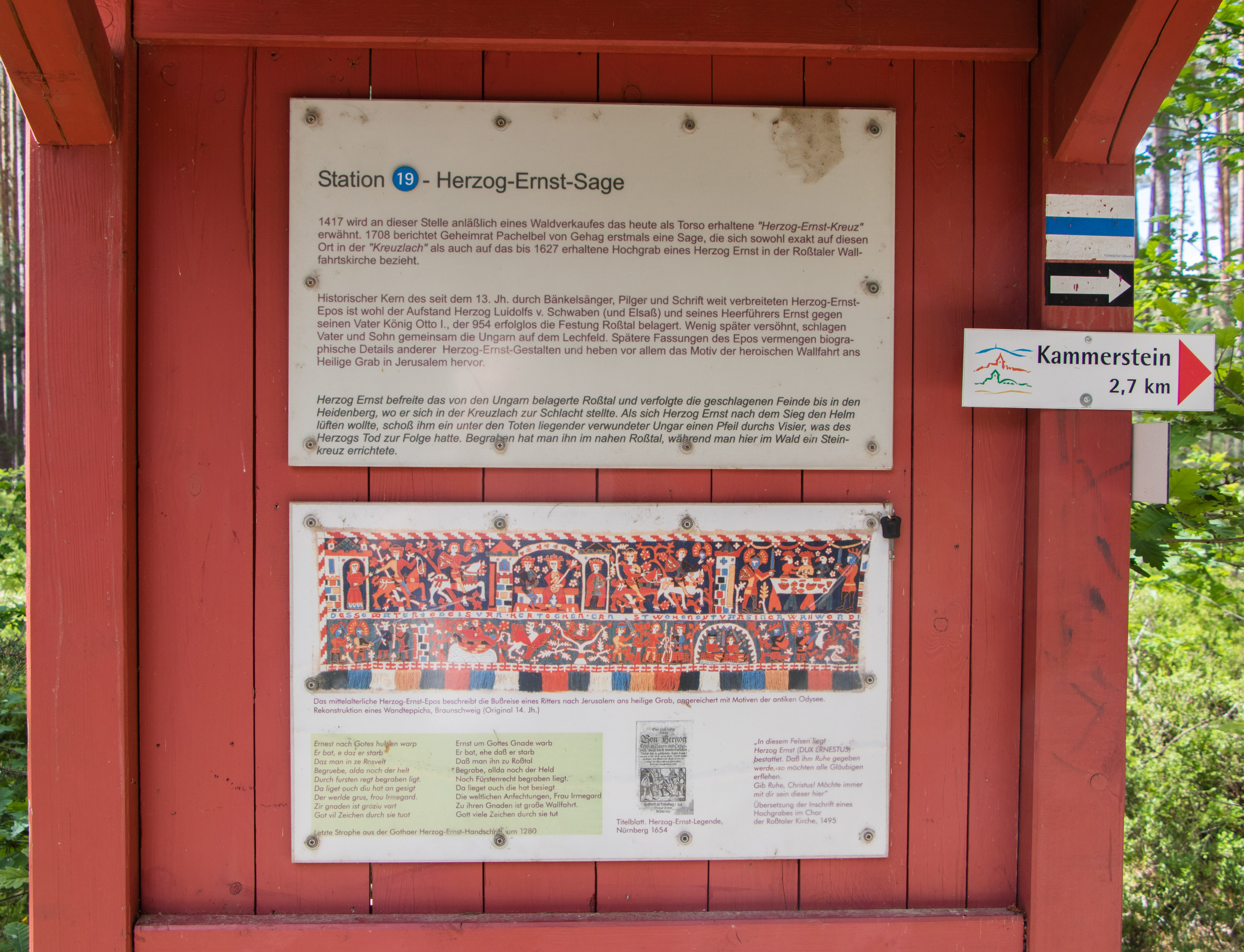 Herzog-Ernst-Kreuz, Heidenberg, Büchenbach